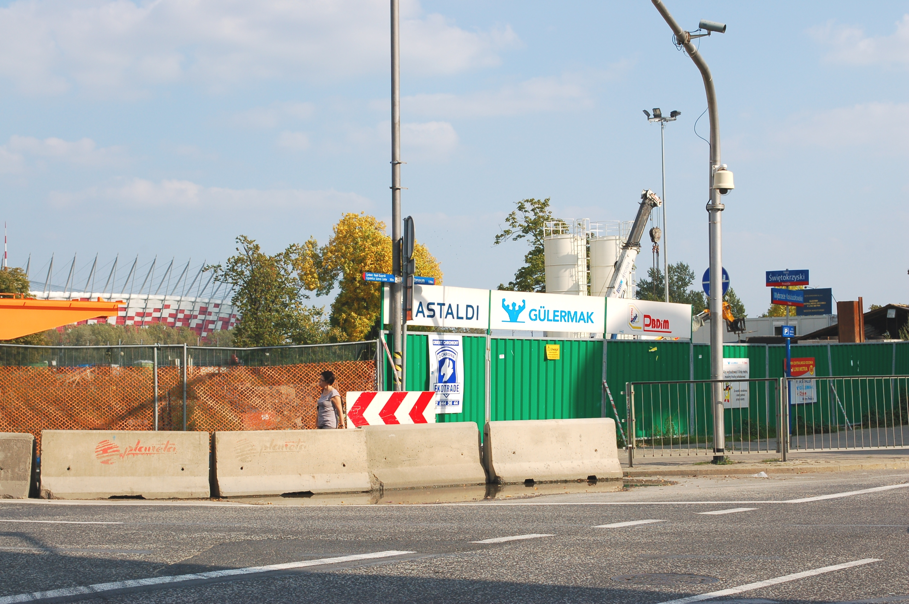 Metro construction site at Wybrzeże Kościuszkowskie Street in Warsaw